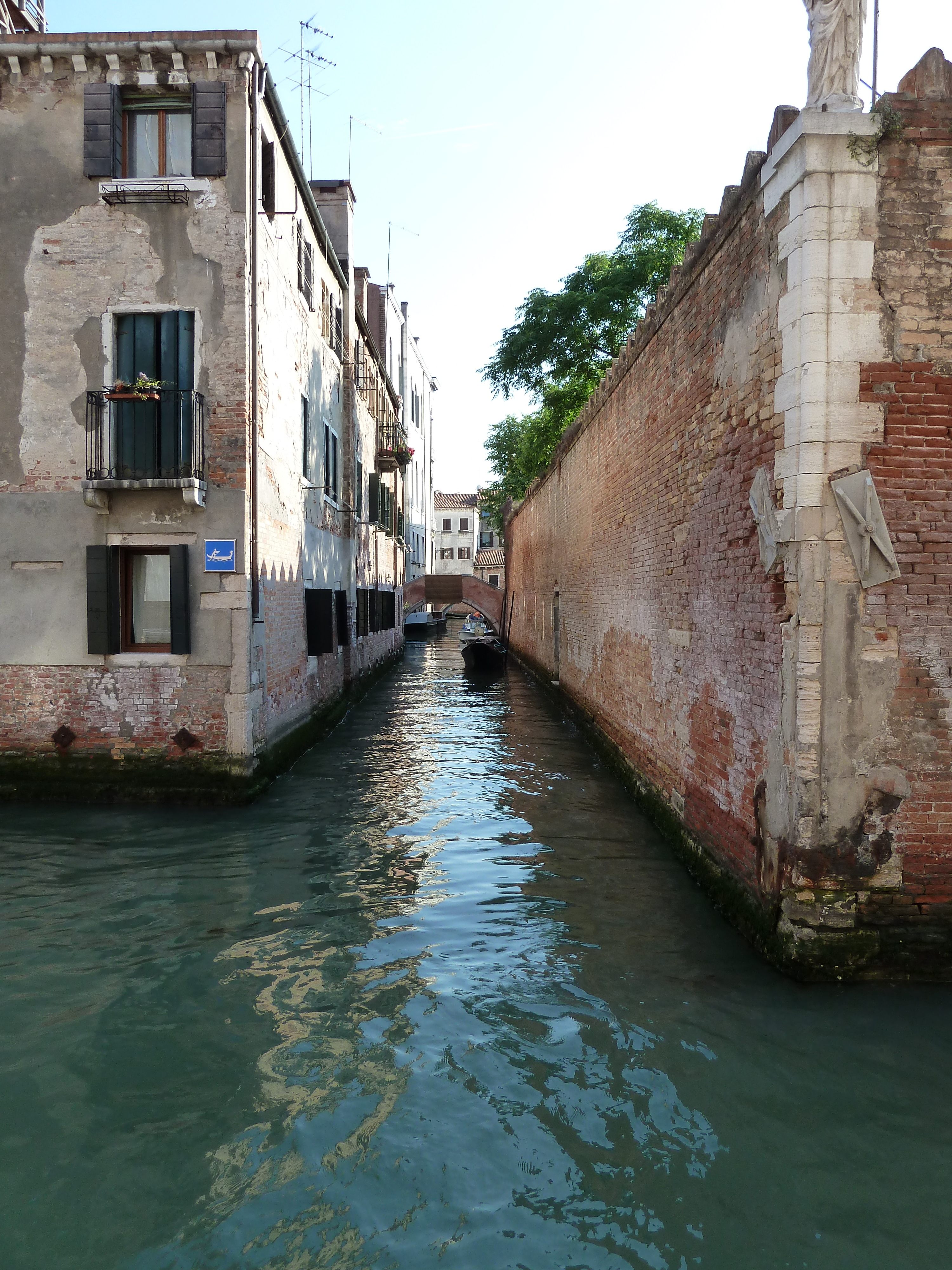 rio grimani